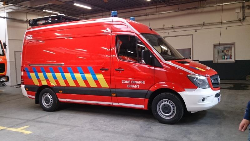 Camionnette des pompiers de Dinant, en Belgique